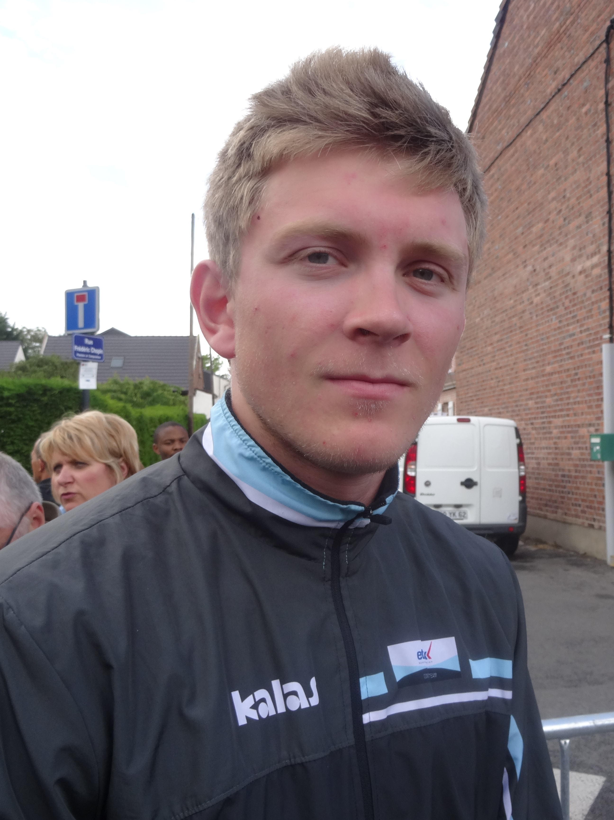 Reportage photographique réalisé le vendredi 23 mai 2014 à l'occasion du départ de la première étape du Paris-Arras Tour 2014 à Lens, Pas-de-Calais, Nord-Pas-de-Calais, France. Depicted person: Daniel Hoelgaard